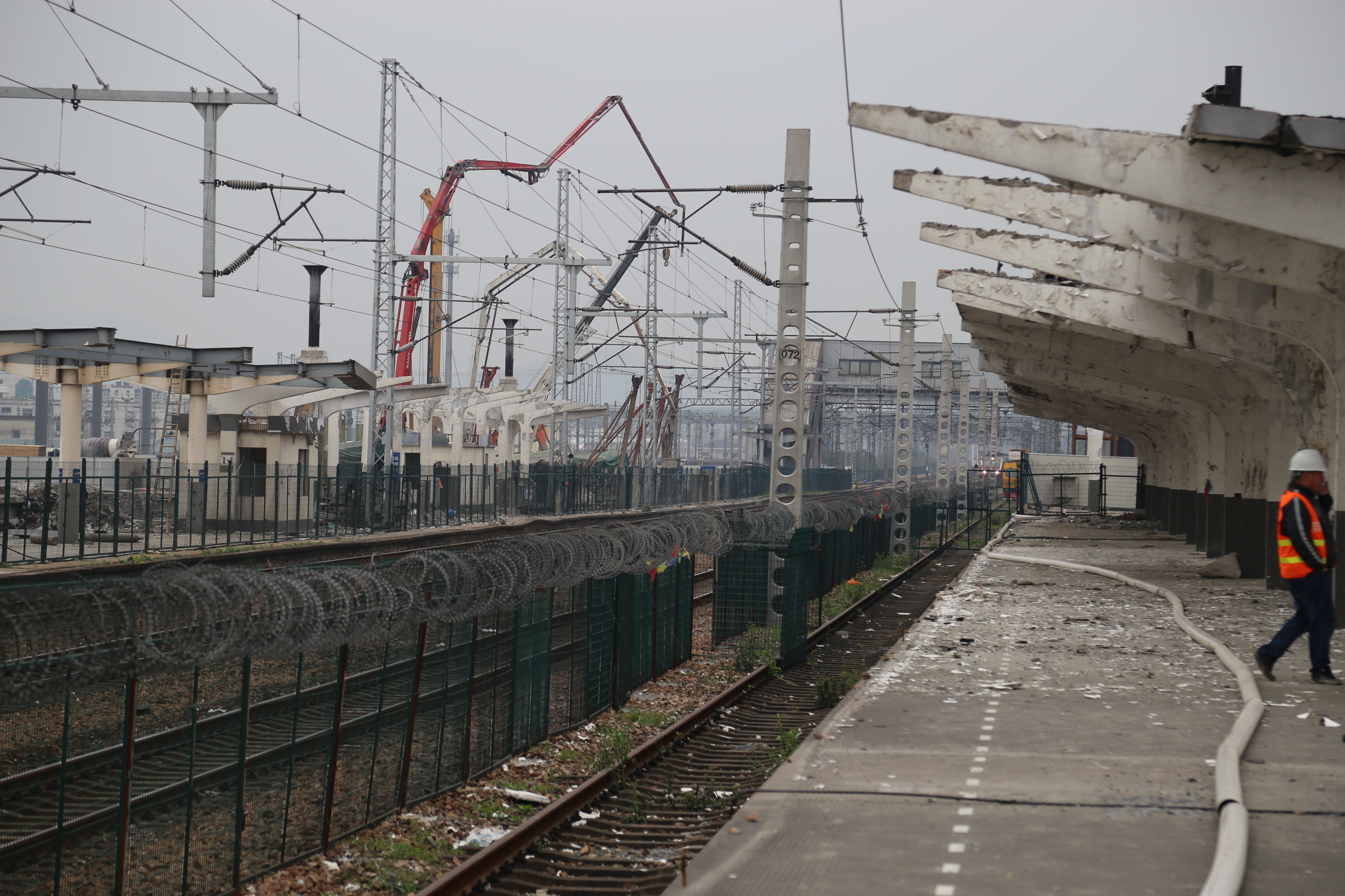 重建中的杭州南站站房，2015年4月